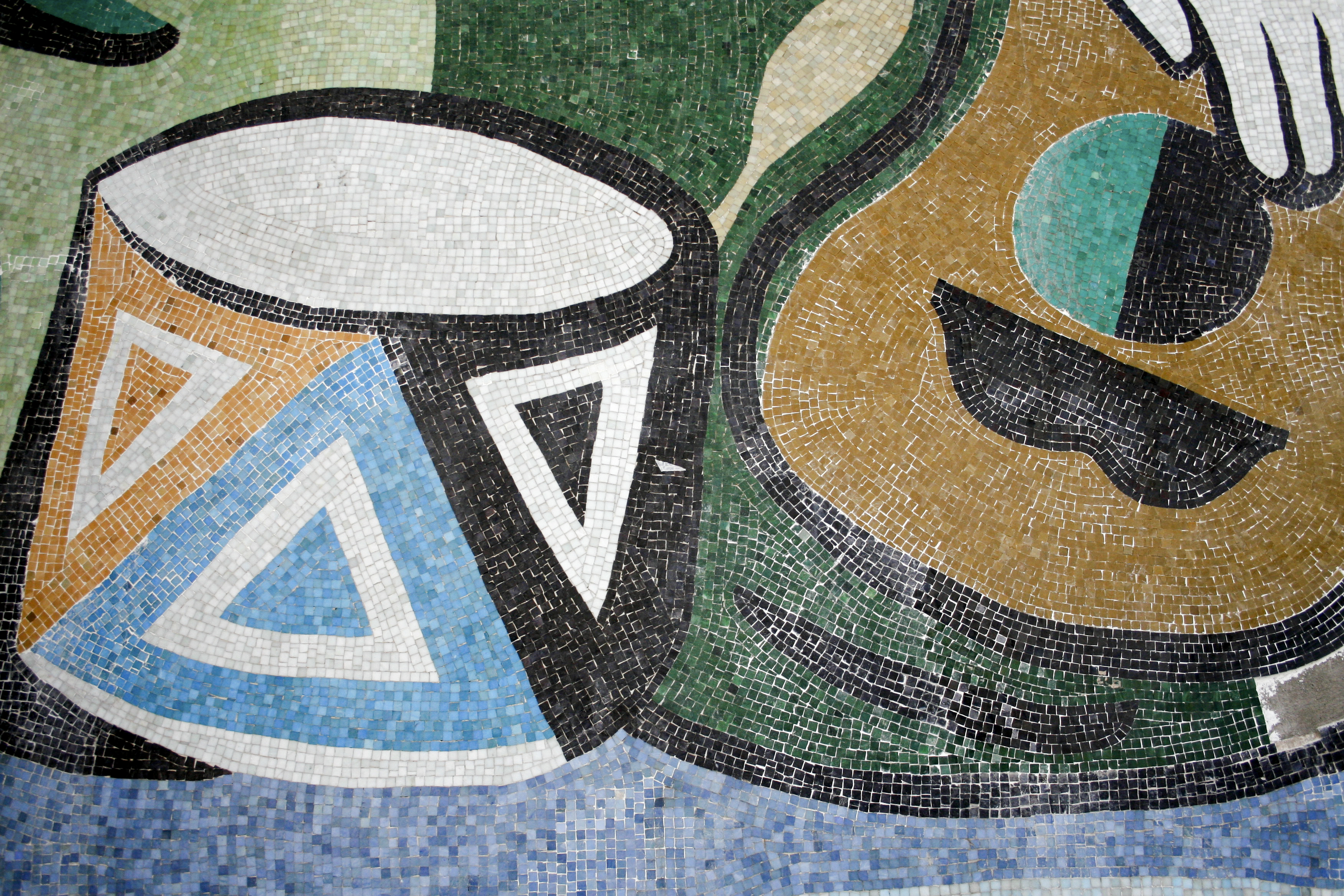 Visão aproximada do painel de Emiliano Di Cavalcanti feito com pastilhas na fachada do Teatro Cultura Artística, em São Paulo (SP), Brasil